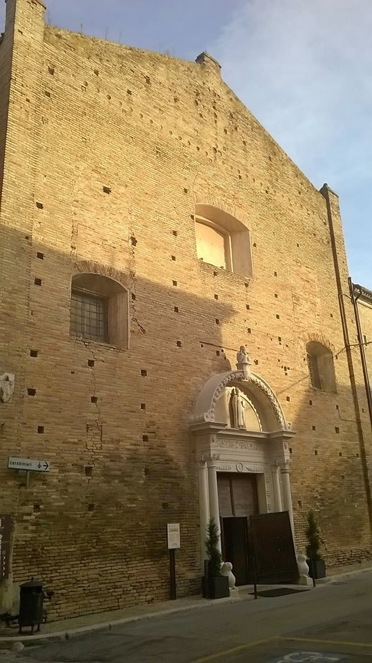 complesso di S. Agostino This is a photo of a monument which is part of cultural heritage of Italy.